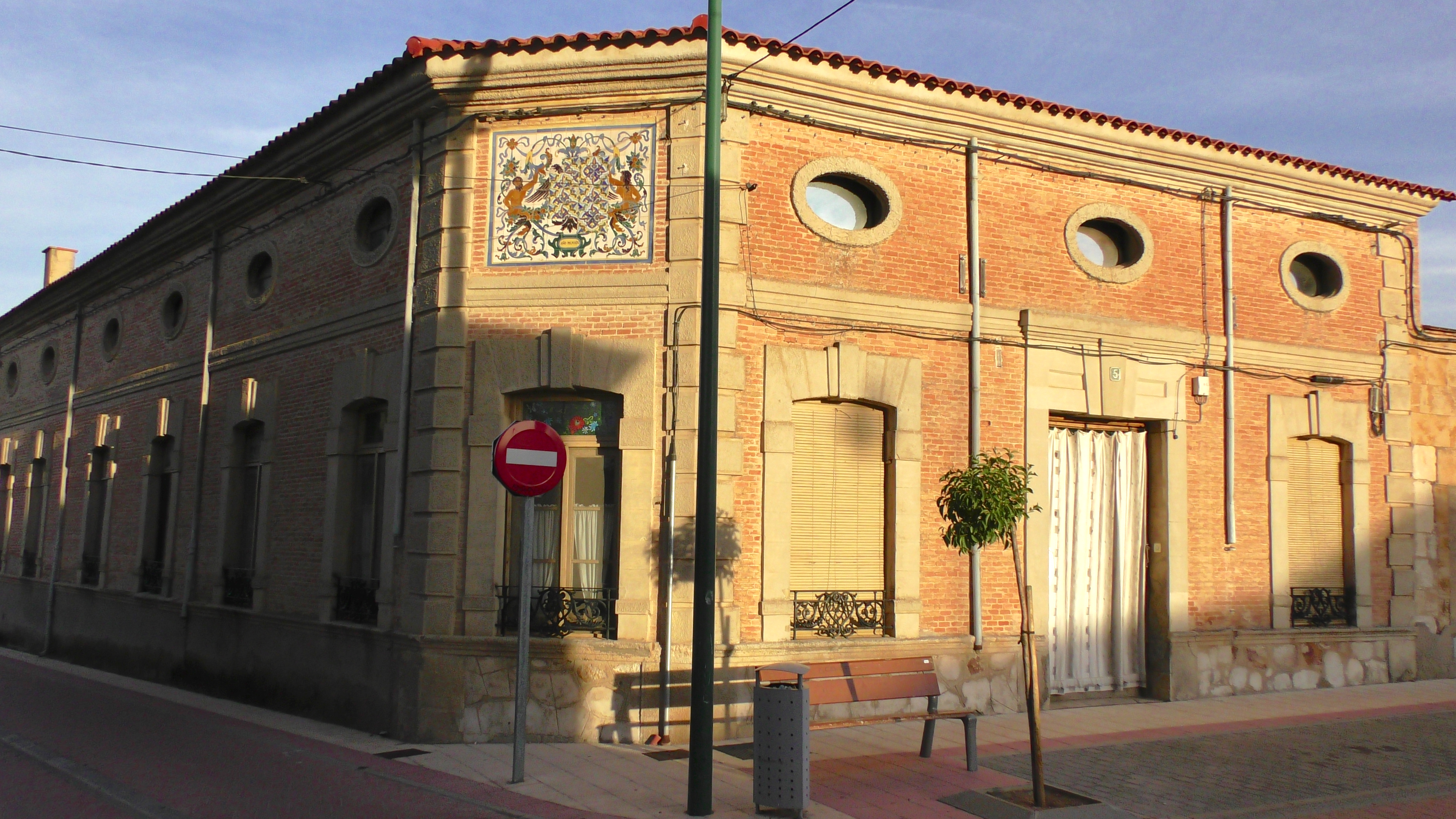 Villaralbo